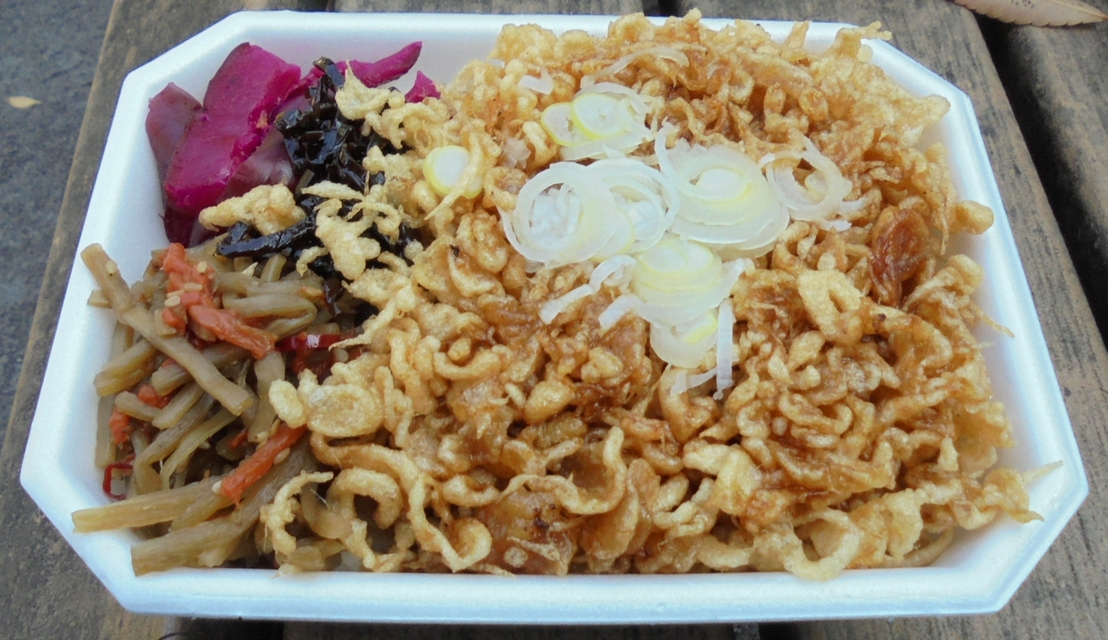 たぬき丼 (Tanuki-don,Bento).